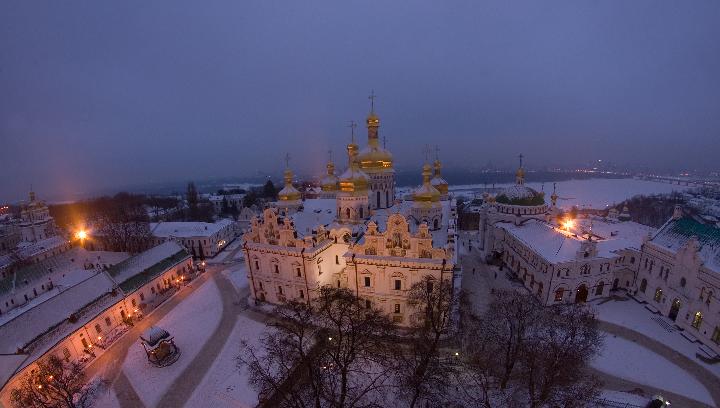 Комплекс Києво-Печерської лаври (Національний заповідник Києво-Печерська Лавра), Київ, Лаврська вул., 9, 15